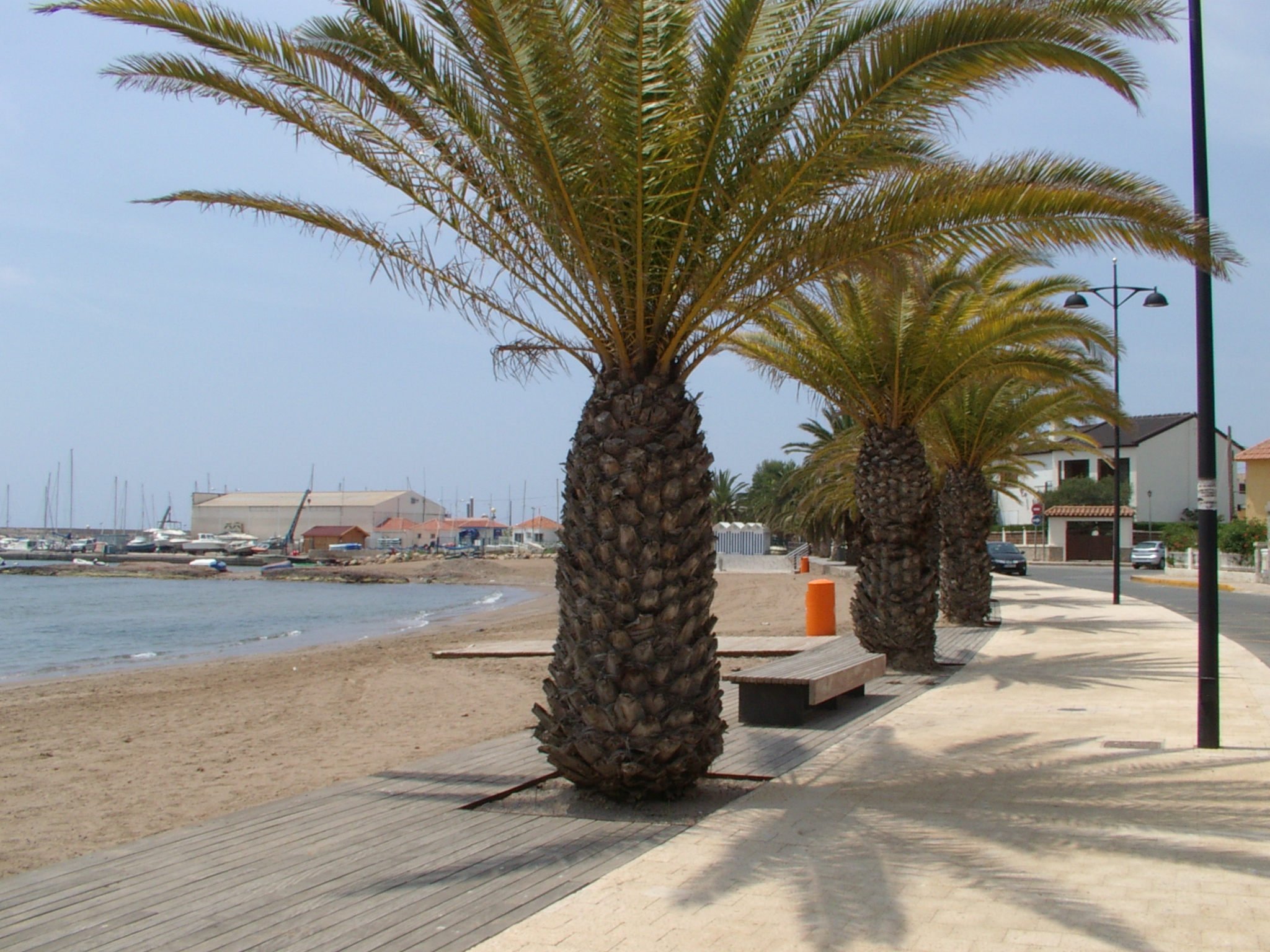 Puert De Mazarron